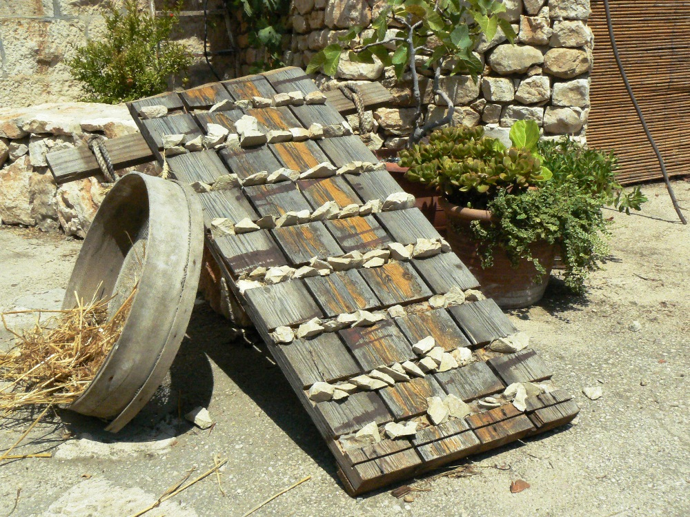 מורג במוזיאון ימי התנך בעין כרם רישיון נוצר על ידי משתמש:י.ש.